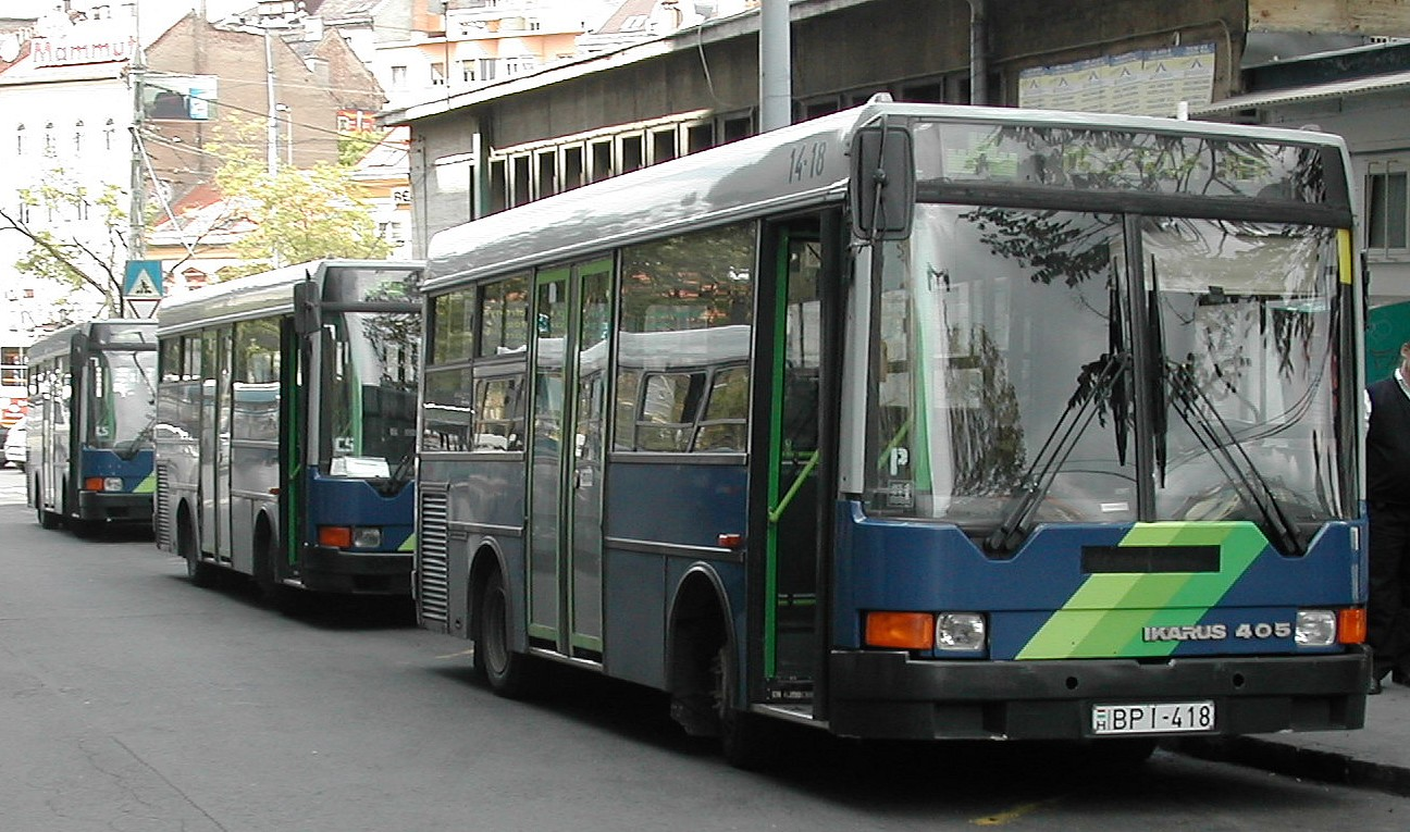 Ikarus-405 in Budapest